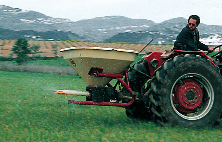 Aplicació d'adob nitrogenat granulat en superfície en un camp de cereals de Torre Marimon - Caldes de Montbui (Vallès Oriental), abril de 1997.